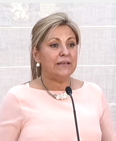 Rosa Valdeón.